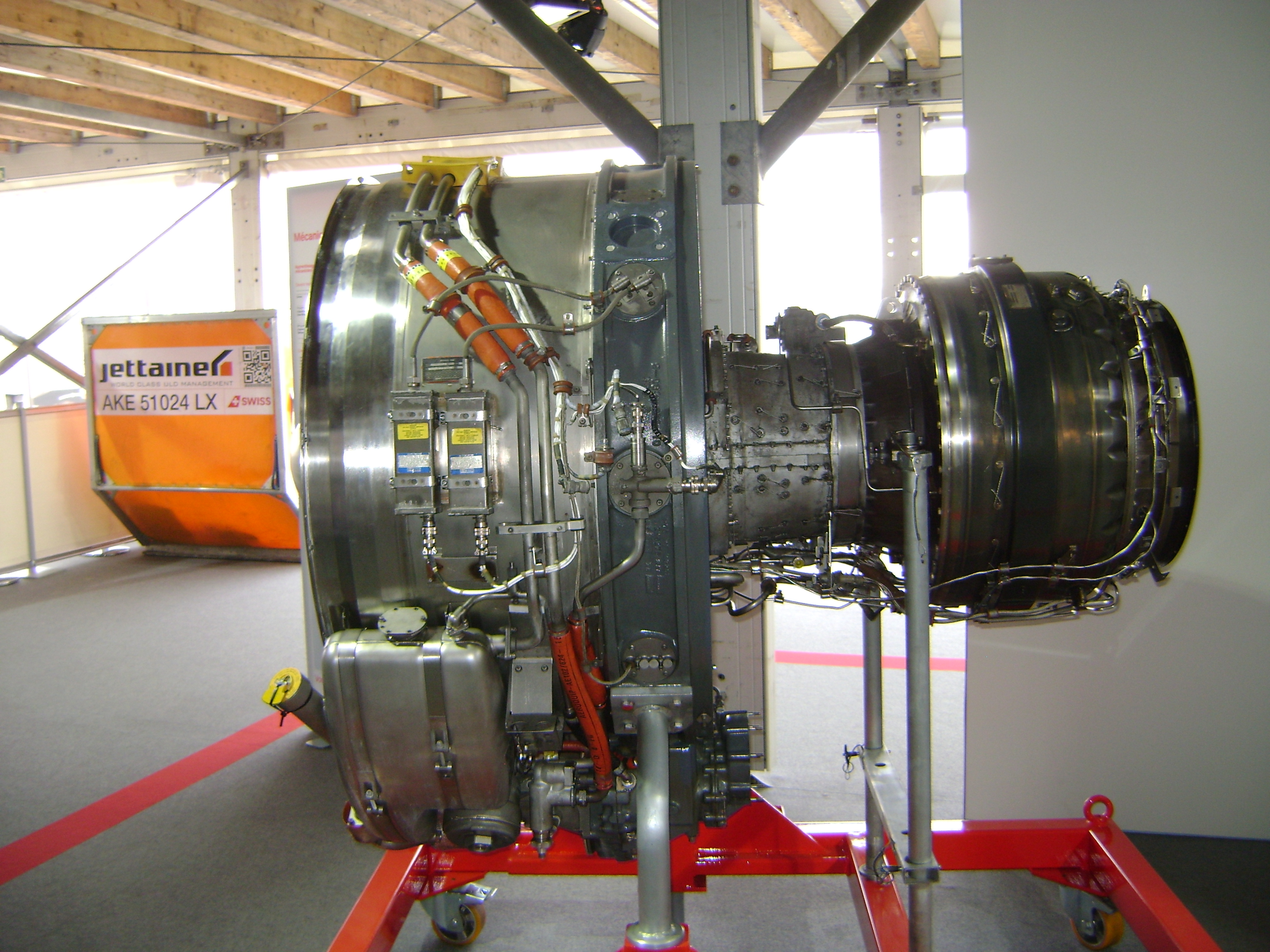 Avro Engine